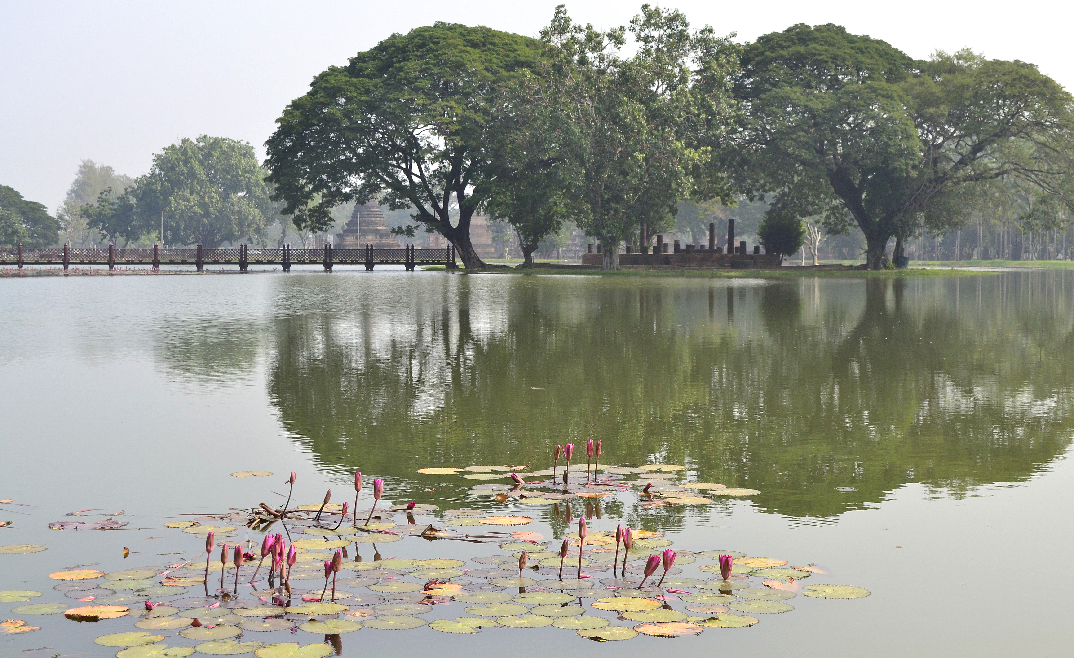 Insel östlich von Wat Traphang Ngoen im Geschichtspark Sukhothai. Blick nach Osten: Im Hintergrund Wat Mahathat.